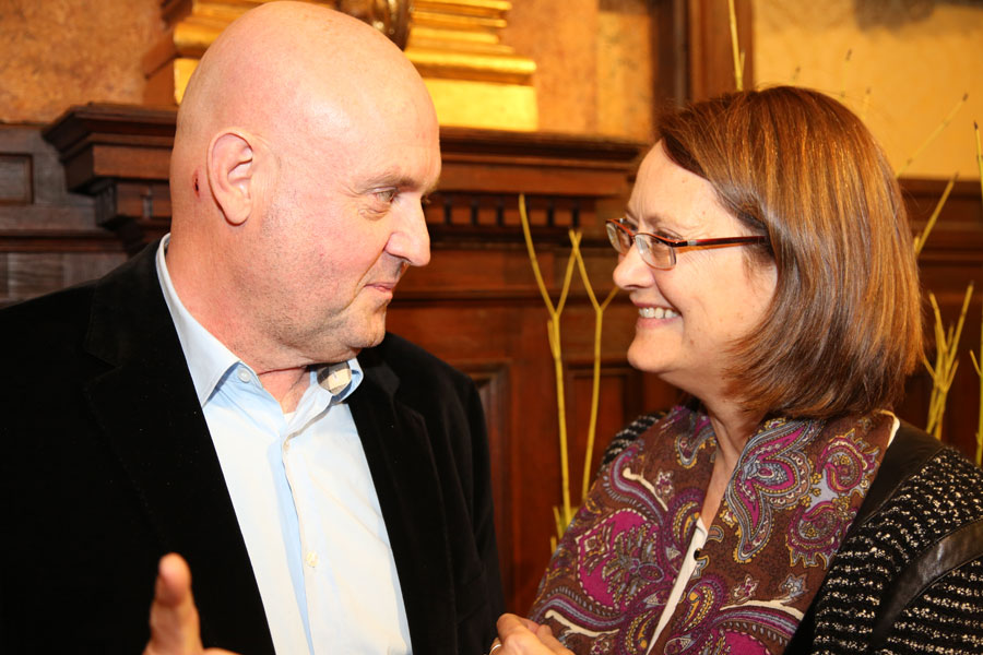 Verleihung der Wilhelm Exner Medaille am 18. November 2014 im Österreichischer Gewerbeverein: Michael Doppelmayr, Bente Angell-Hansen